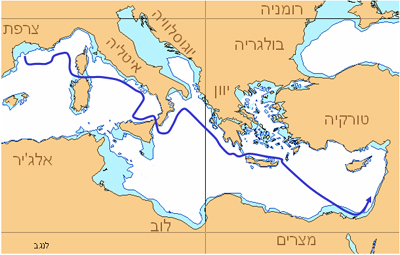 נתיב ההפלגה של אוניית המעפילים לנגב